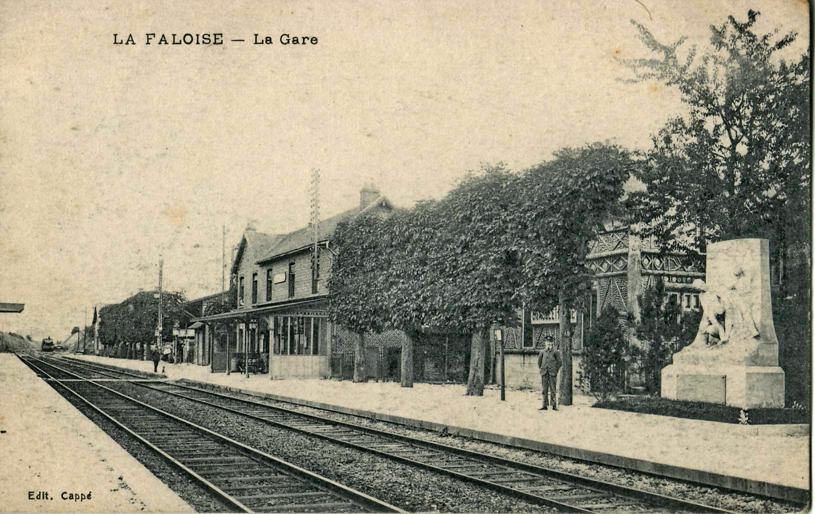 Carte postale ancienne éditée par Cappé : LA FALOISE - La Gare